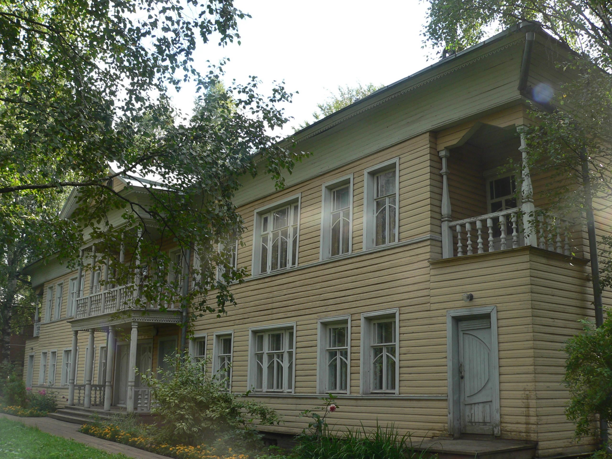 Доходный дом купца Самарина в Вологде. Музей "Вологда на рубеже веков"